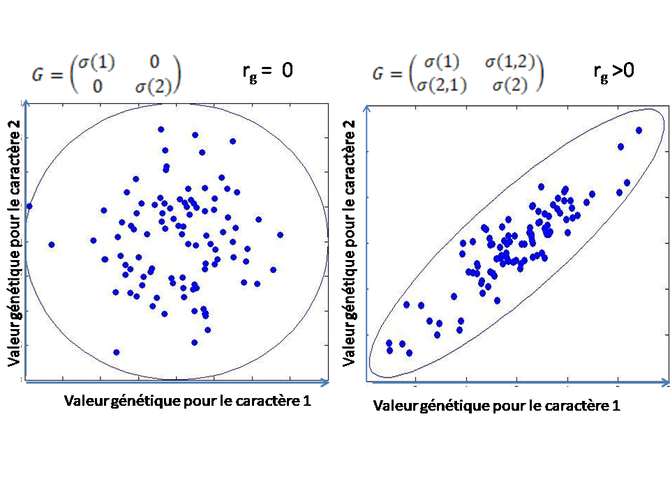 G-ellipse et matrice G pour deux traits non corrélés ou très corrélés